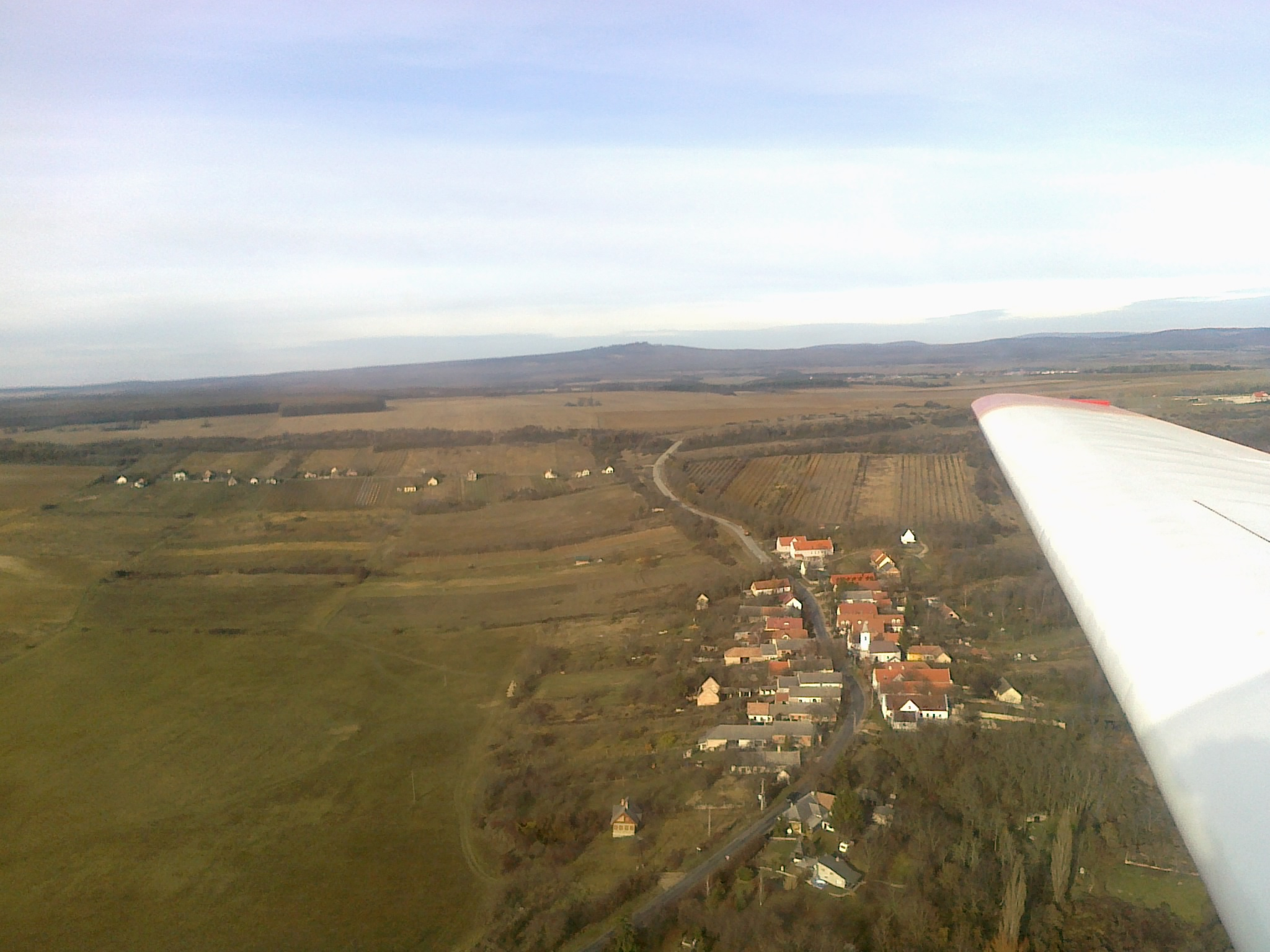 Óbudavár a levegőből